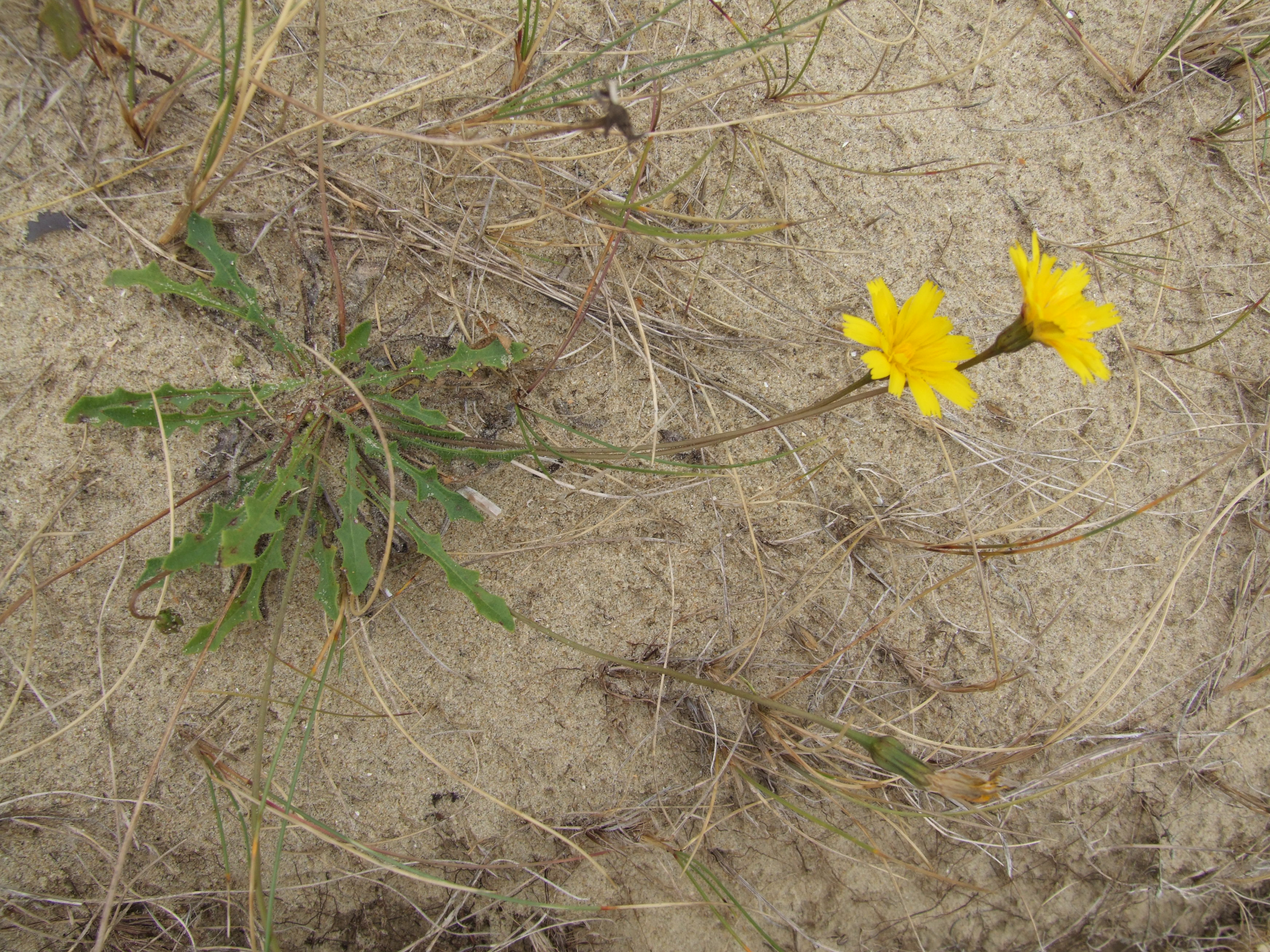 Leontodon saxatilis - Nickender Löwenzahn - Le Liondent à tige nue - Kleine leeuwetand - Ort: Dune du Perroquet, Bray-Dunes, Frankreich